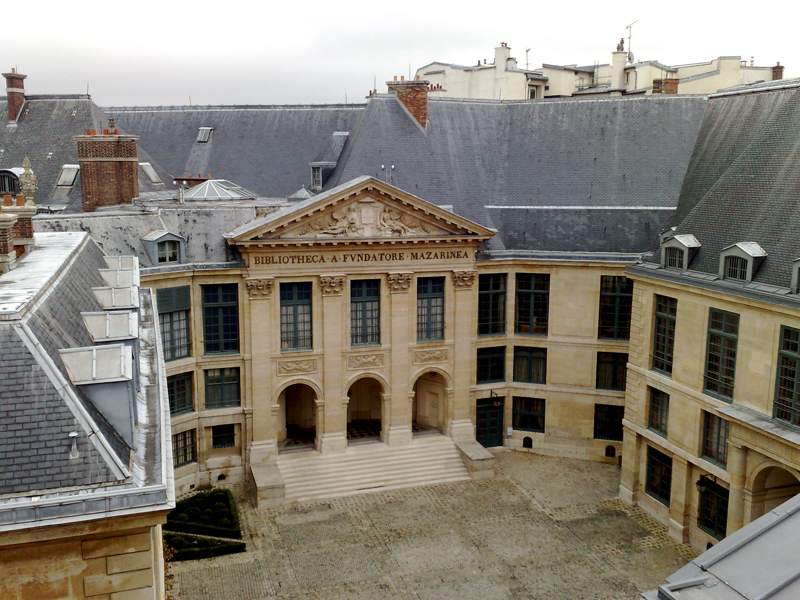 Entrée de la bibliothèque Mazarine - Cour d'honneur de l'Institut de France - Vue de la coupole de l'Institut